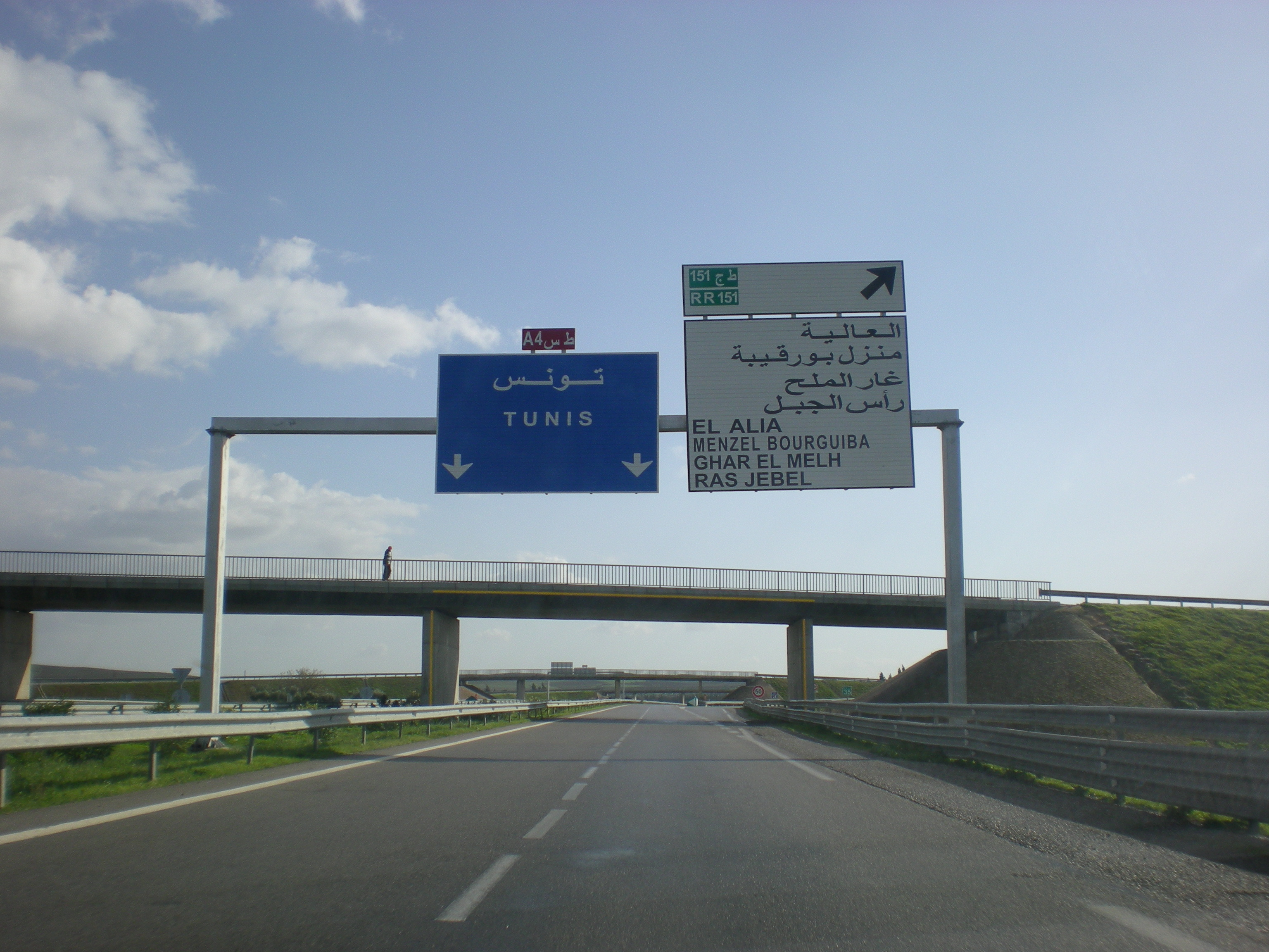 Echangeur El Alia, Autoroute A4, Tunisie